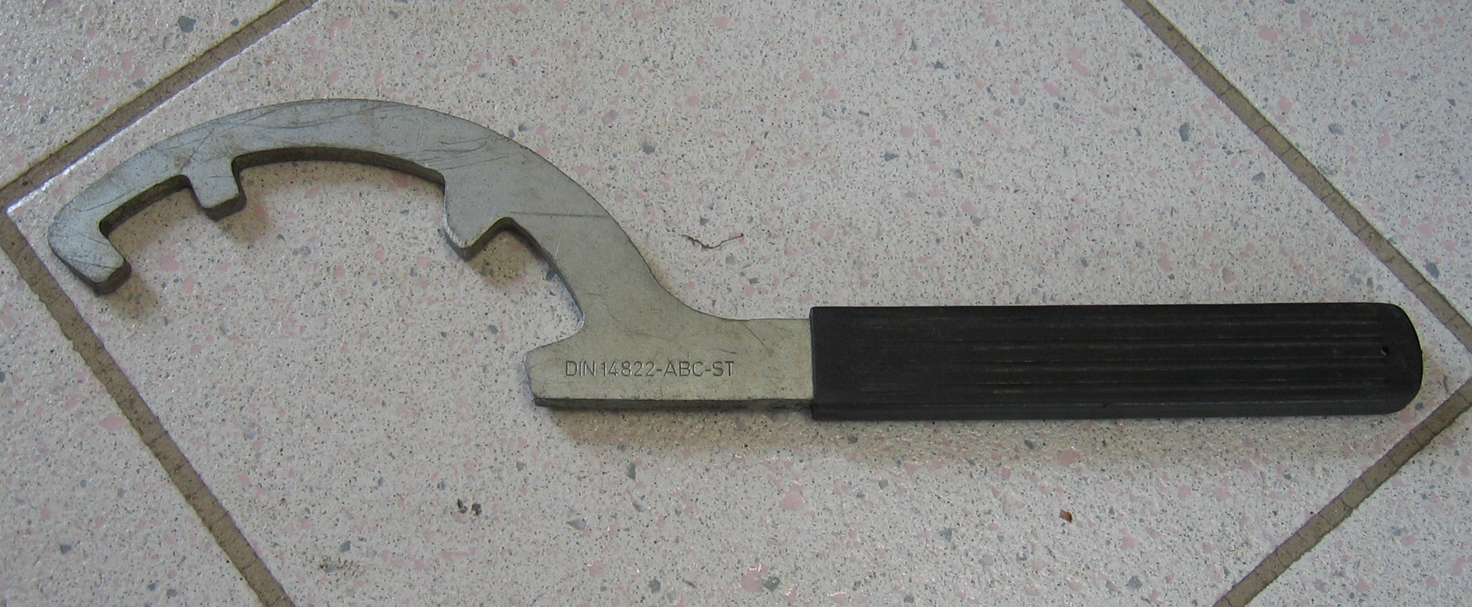 Kupplungsschlüssel